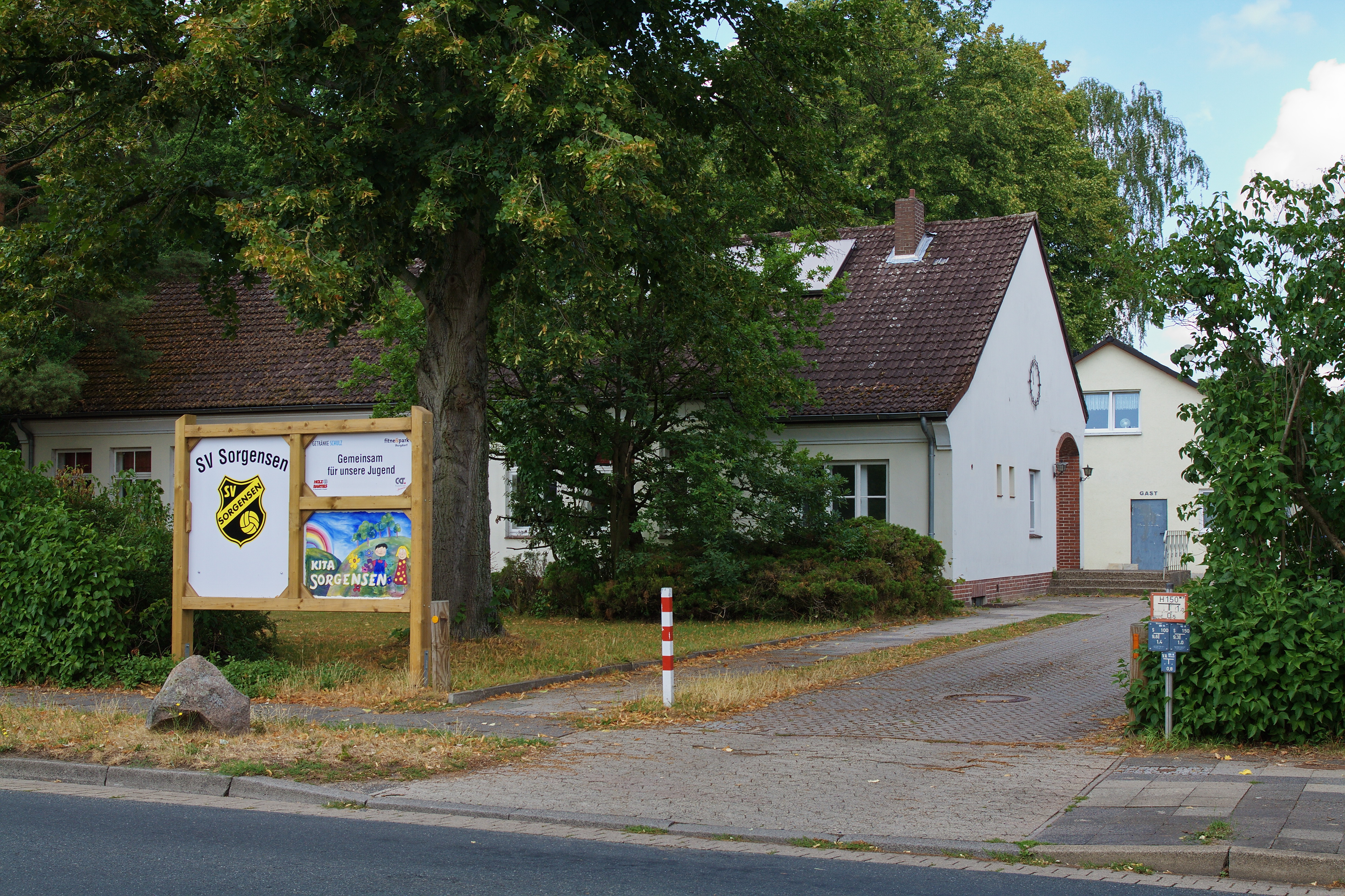 Schule von 1952 (heute eine Kindertagesstätte) in Sorgensen (Burgdorf), Niedersachsen, Deutschland